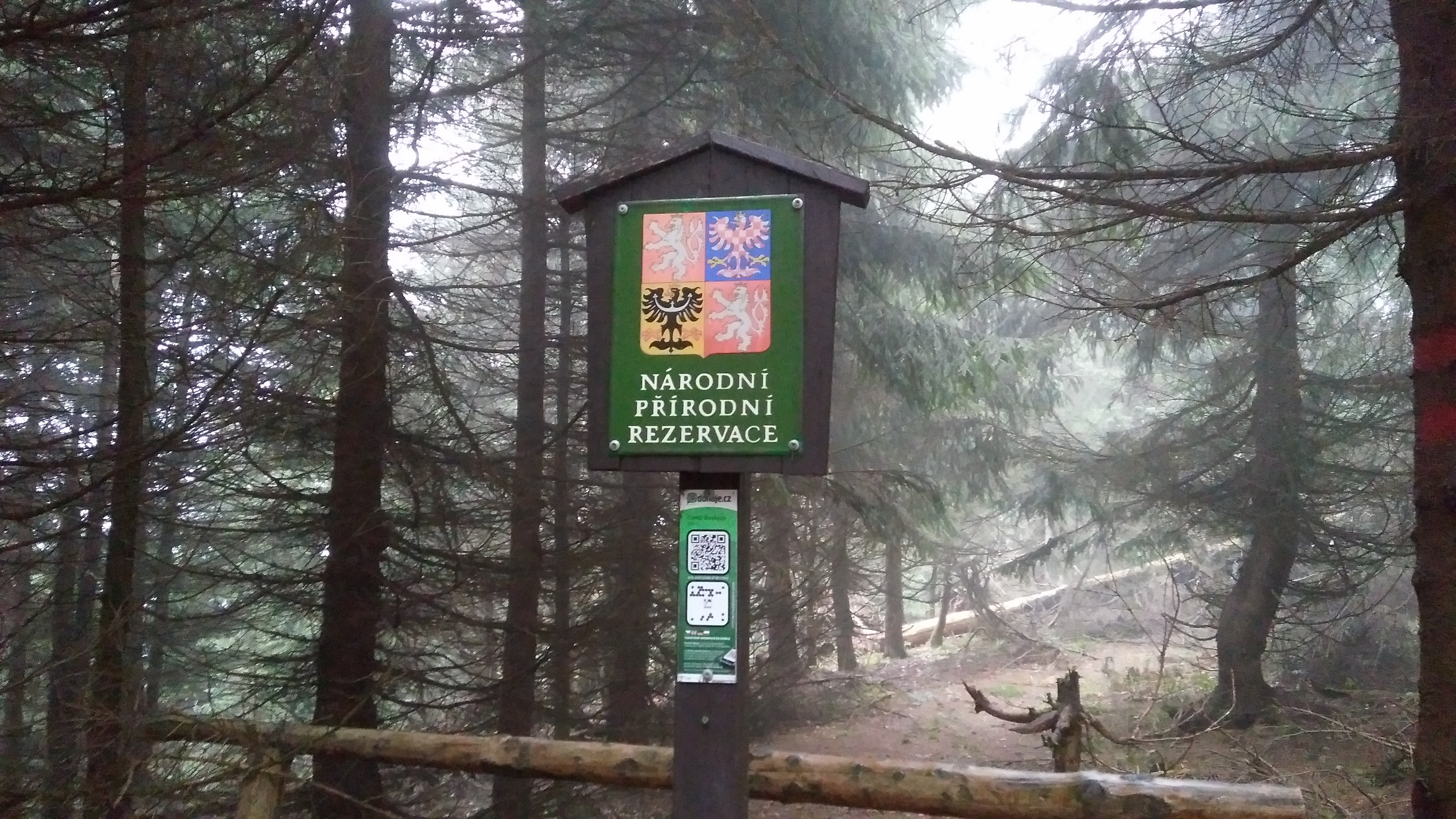 cedule začátku Národní přírodní památky Kněhyně - Čertův mlýn